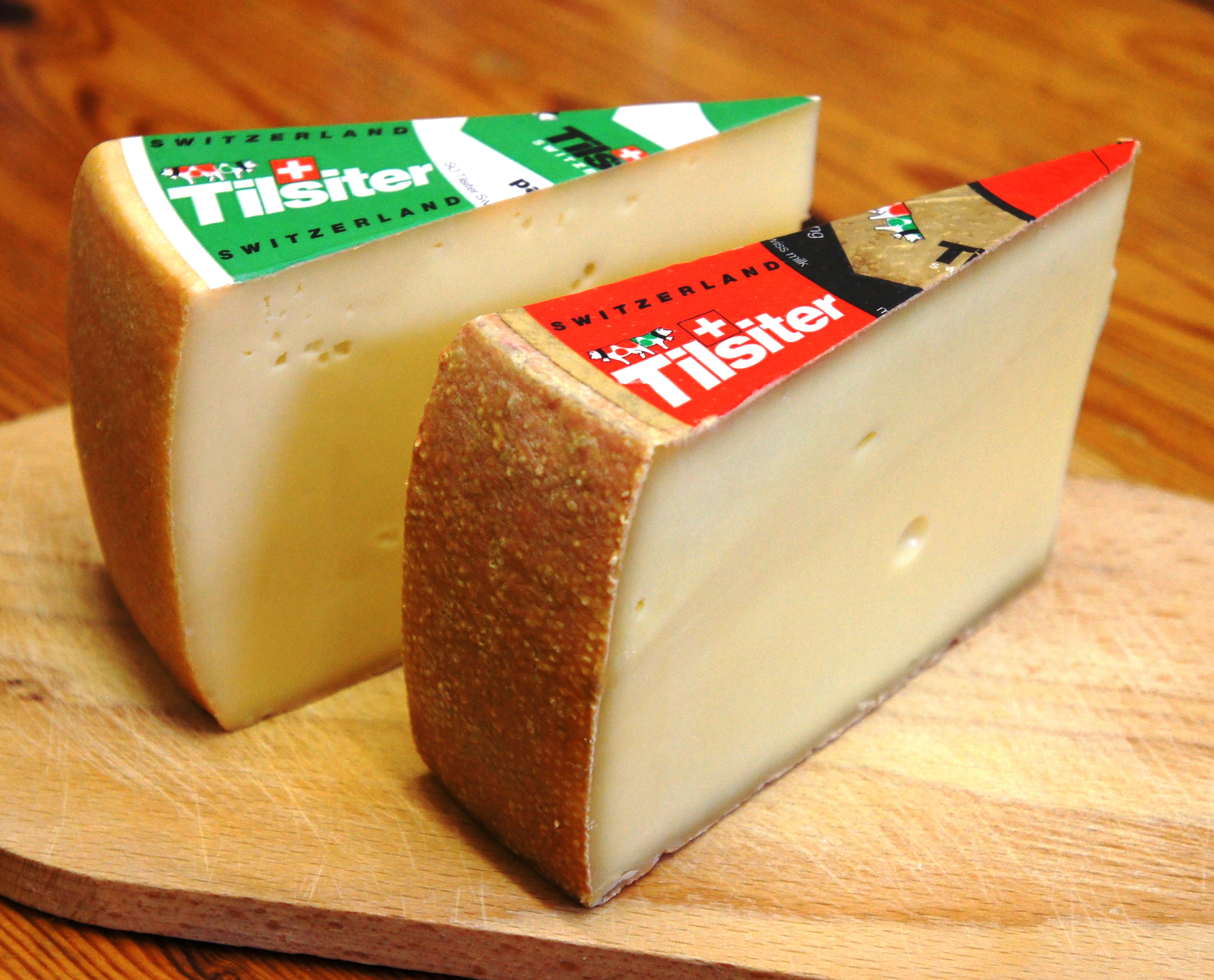 Schweizer Tilsiter grün und rot. Seitliche Ansicht.